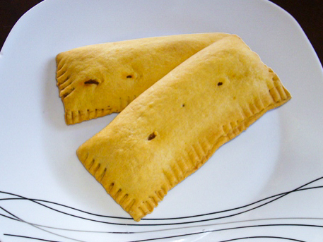 Pati, pastel típico limonense.